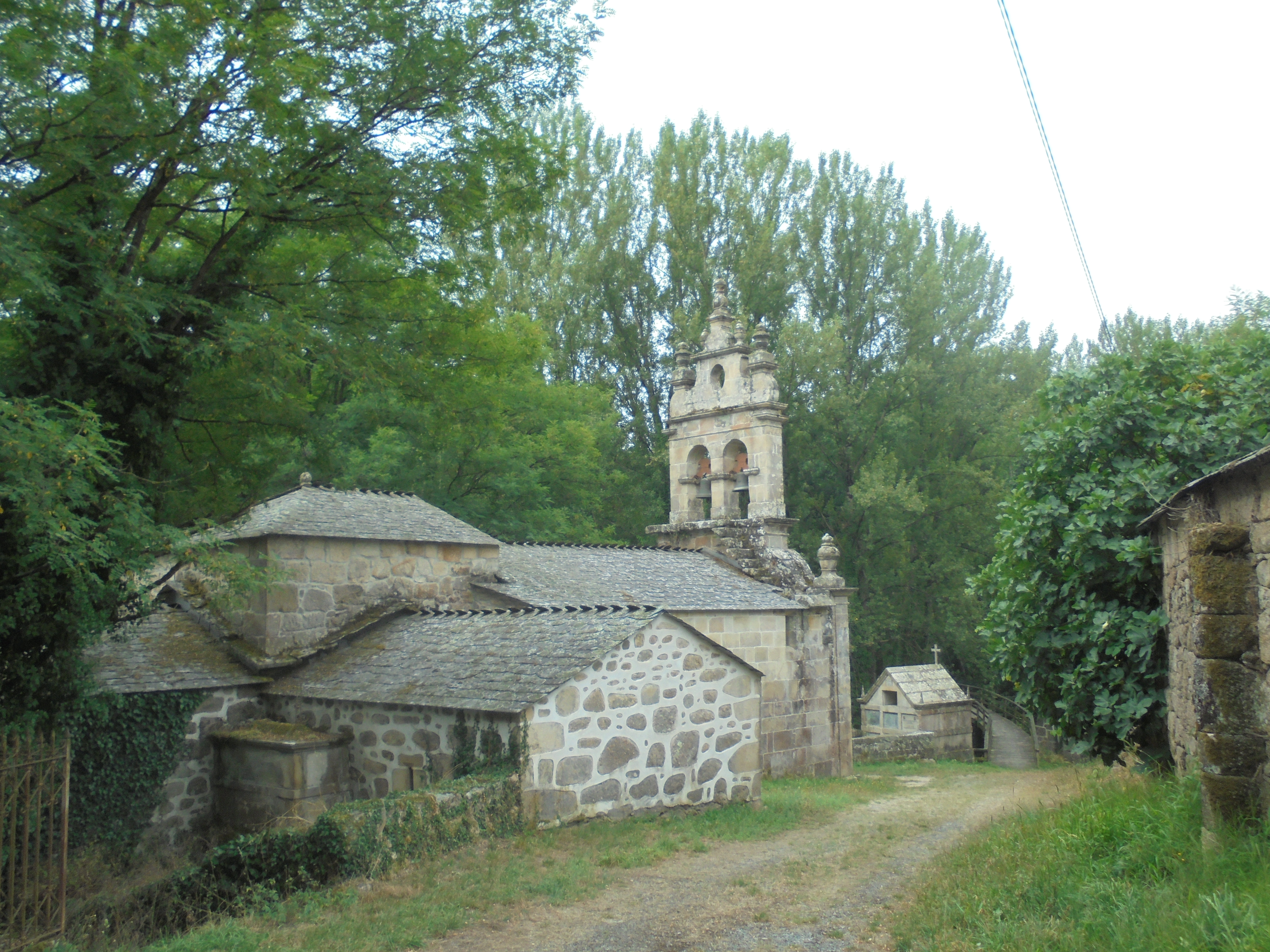 Igrexa parroquial de San Pedro de Ronfe